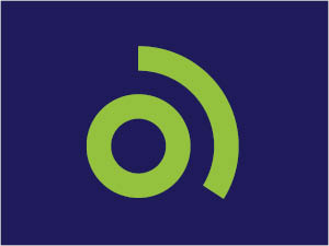 Nya symbolen för arbetsförmedlingen